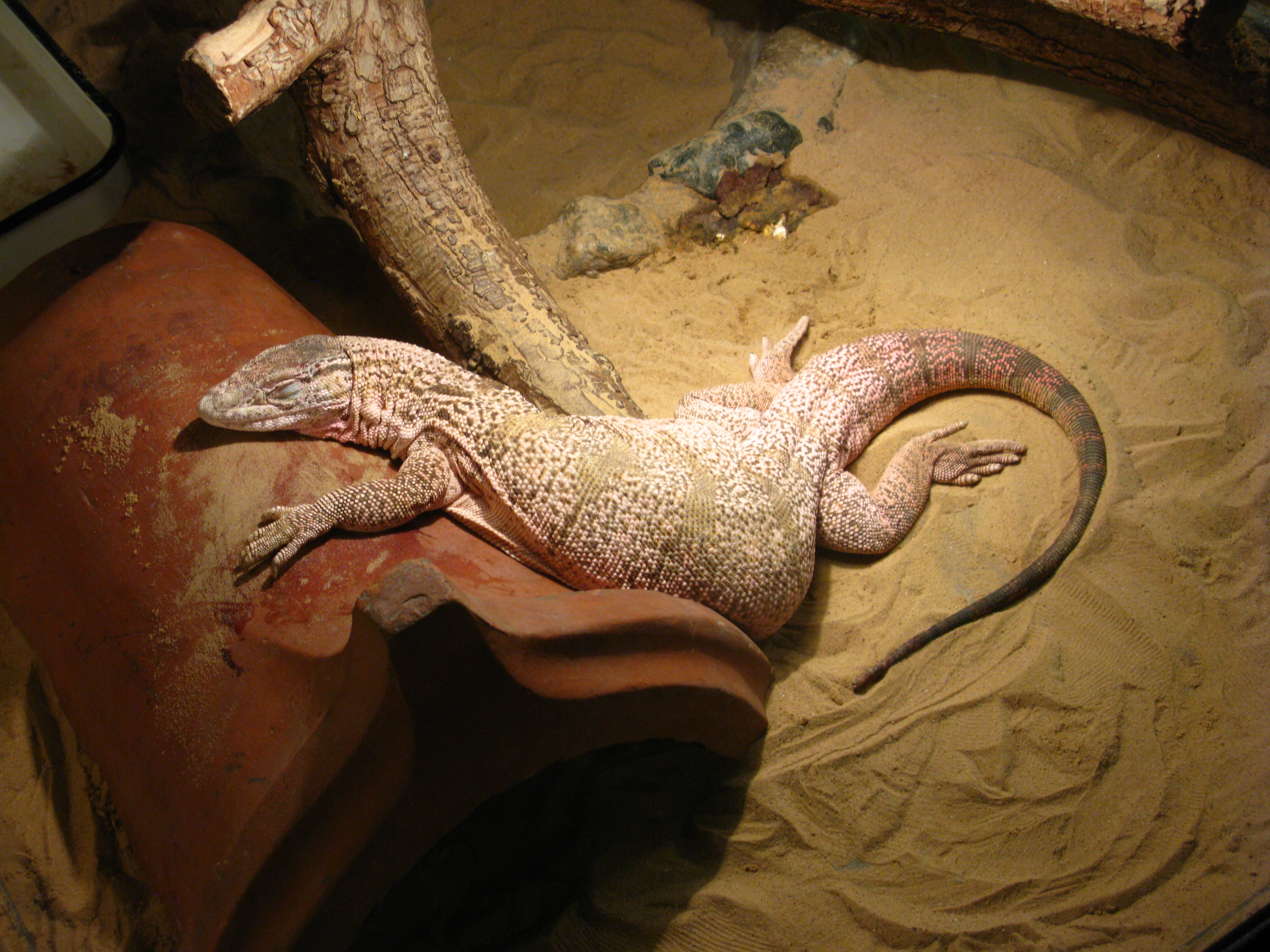 Серый варан (Varanus griseus) в зоопарке города Гродно, Беларусь.